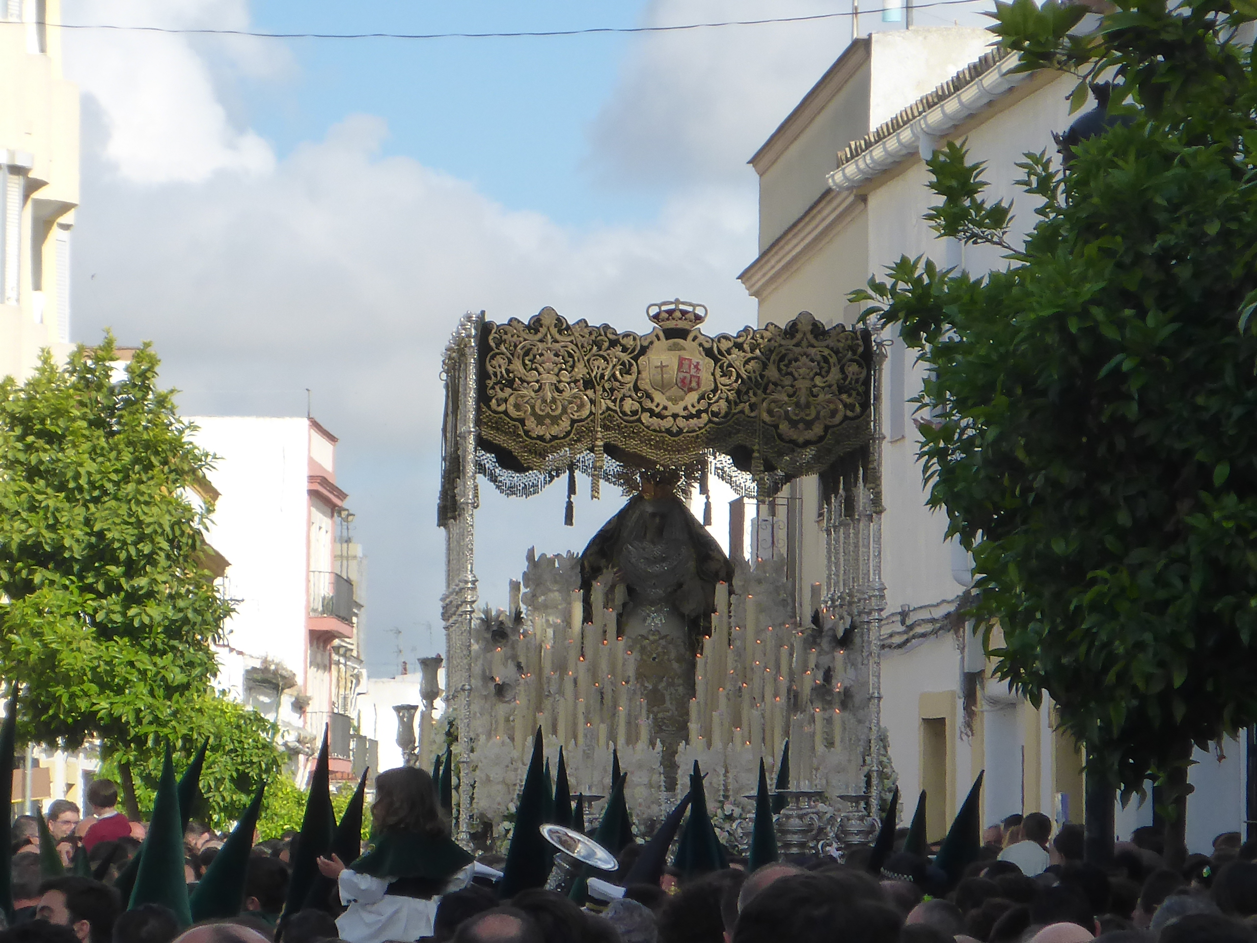 Hermandad de la Yedra (Jerez)